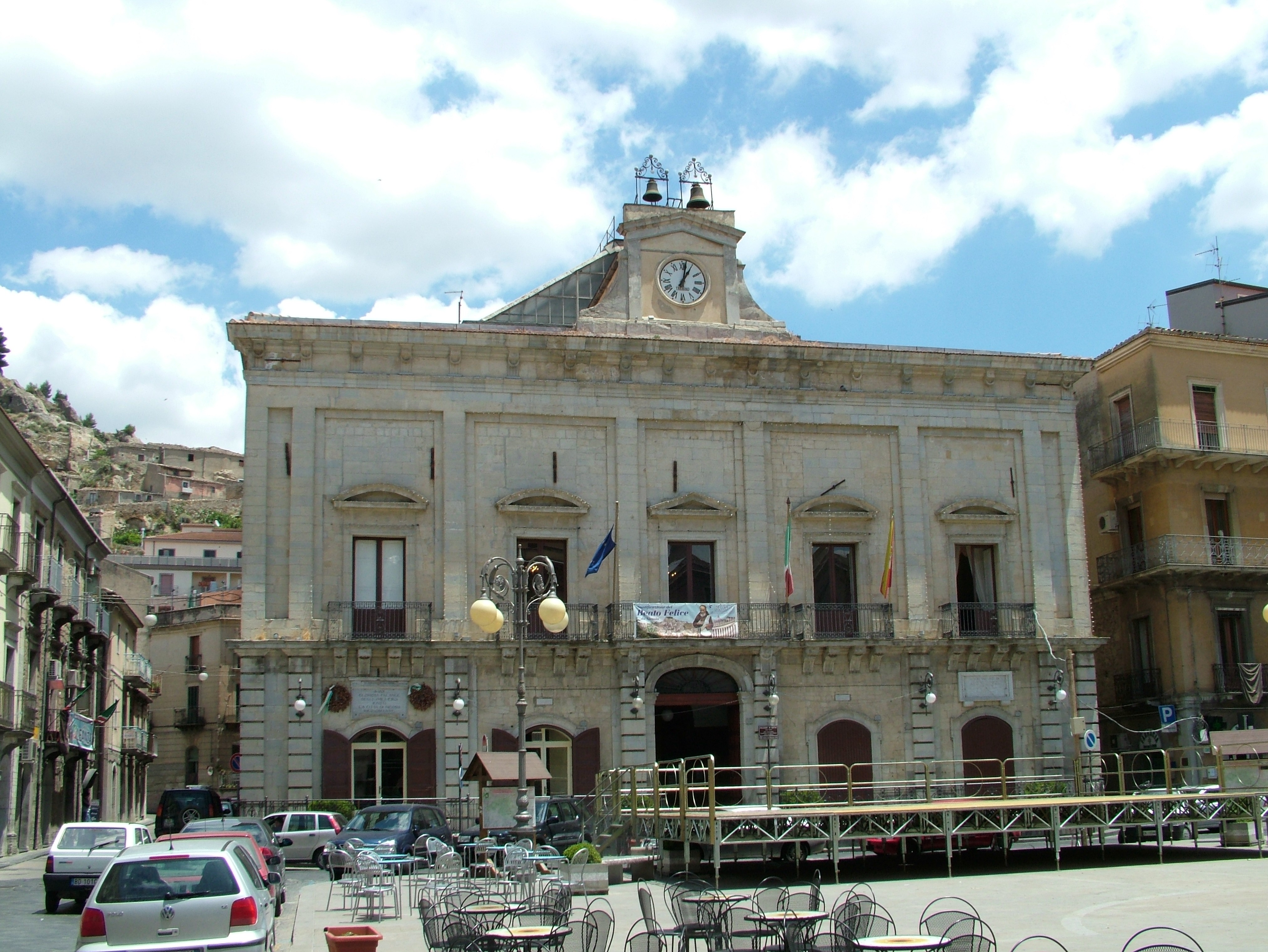 Nicosia, Provinz Enna, Sizilien, der Stadtpalast